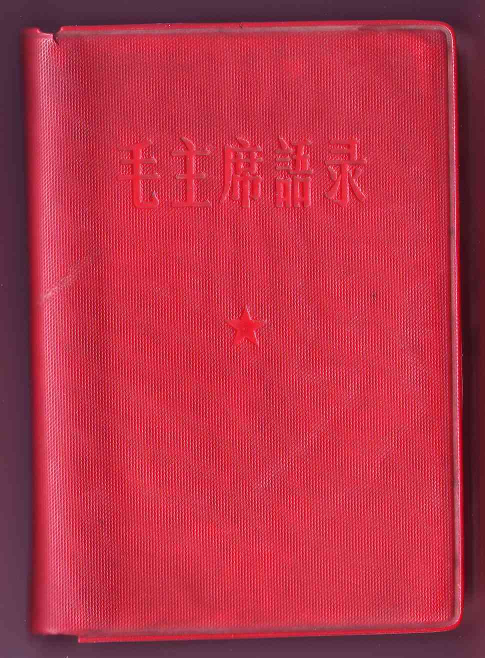 毛主席语录一书的封面